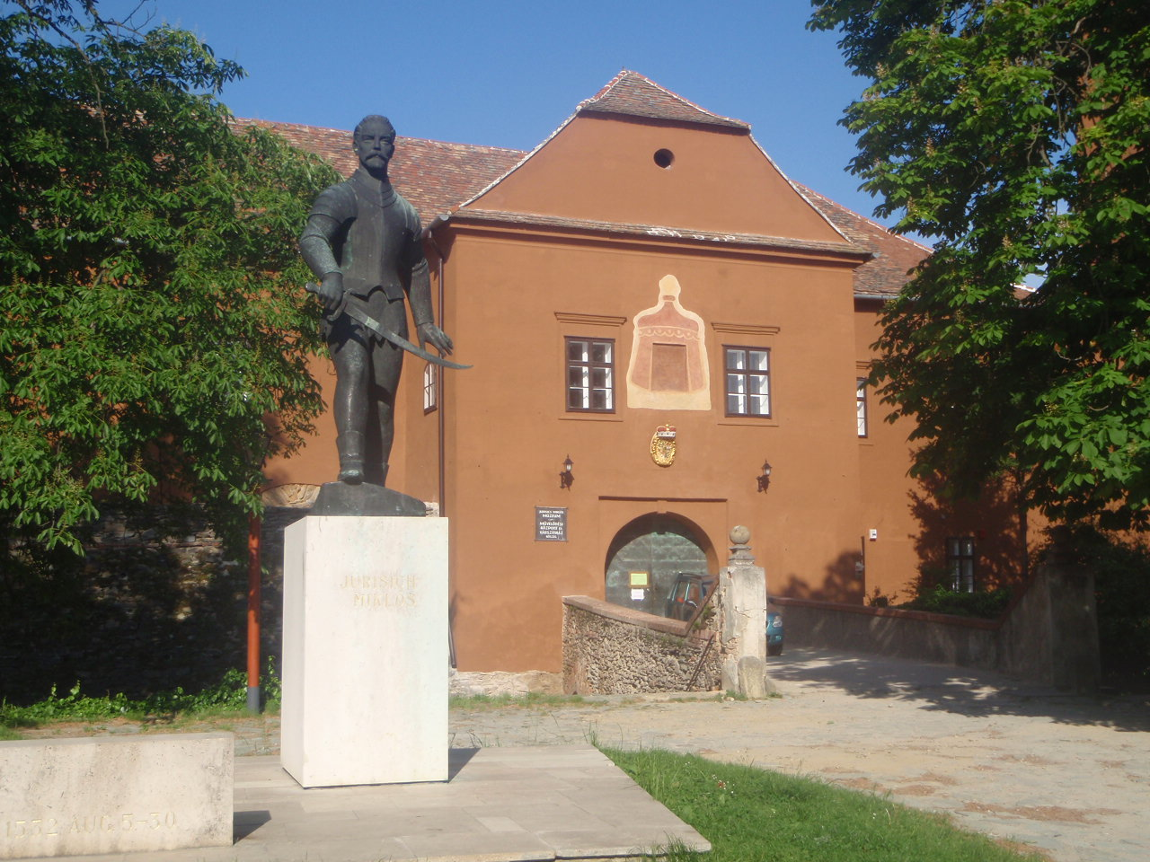 Jurisics Vár Külső udvara a Belső vár felé Jurisics szoborral